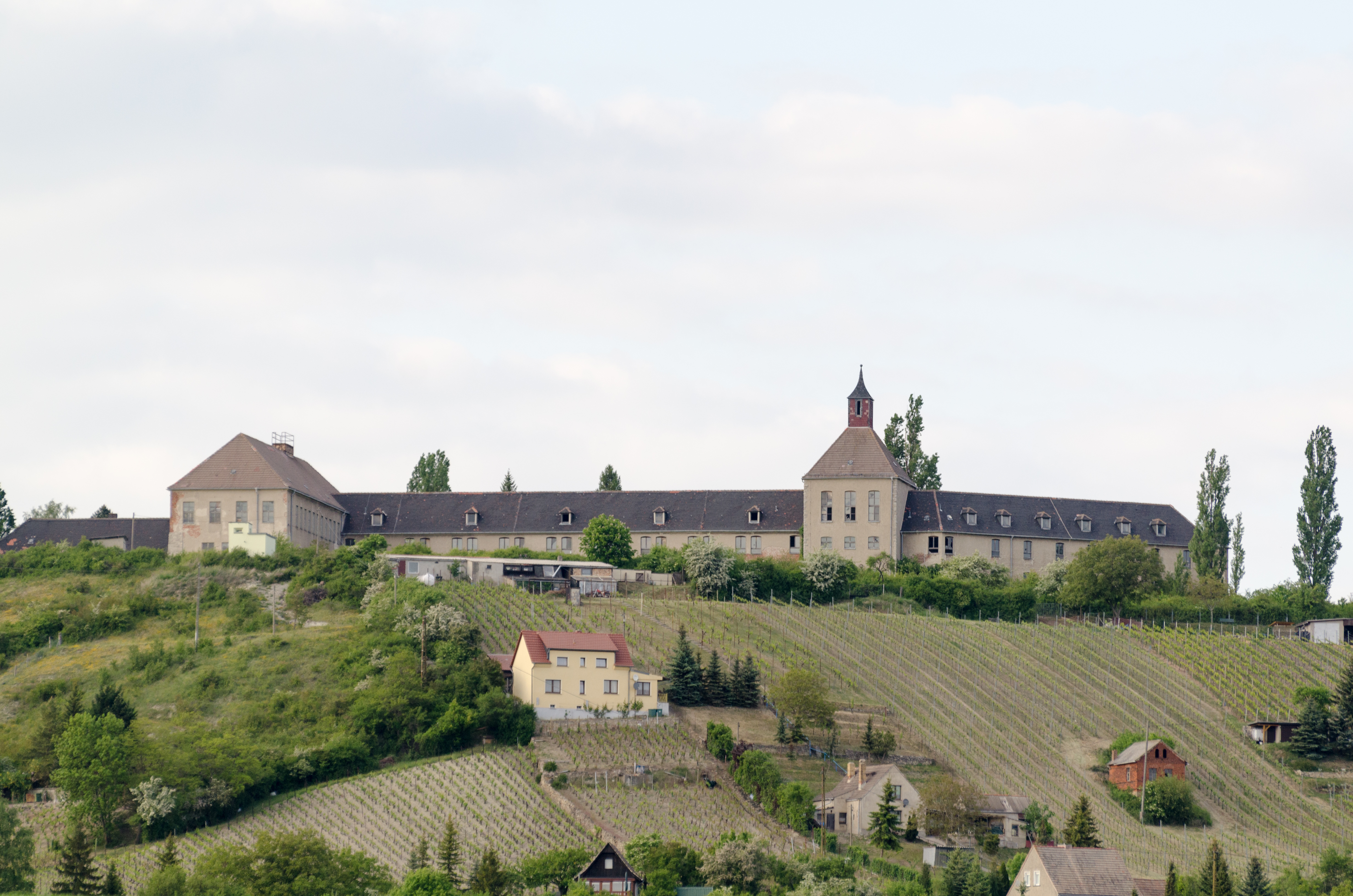 Laucha an der Unstrut, Dorndorf, Weinberghaus